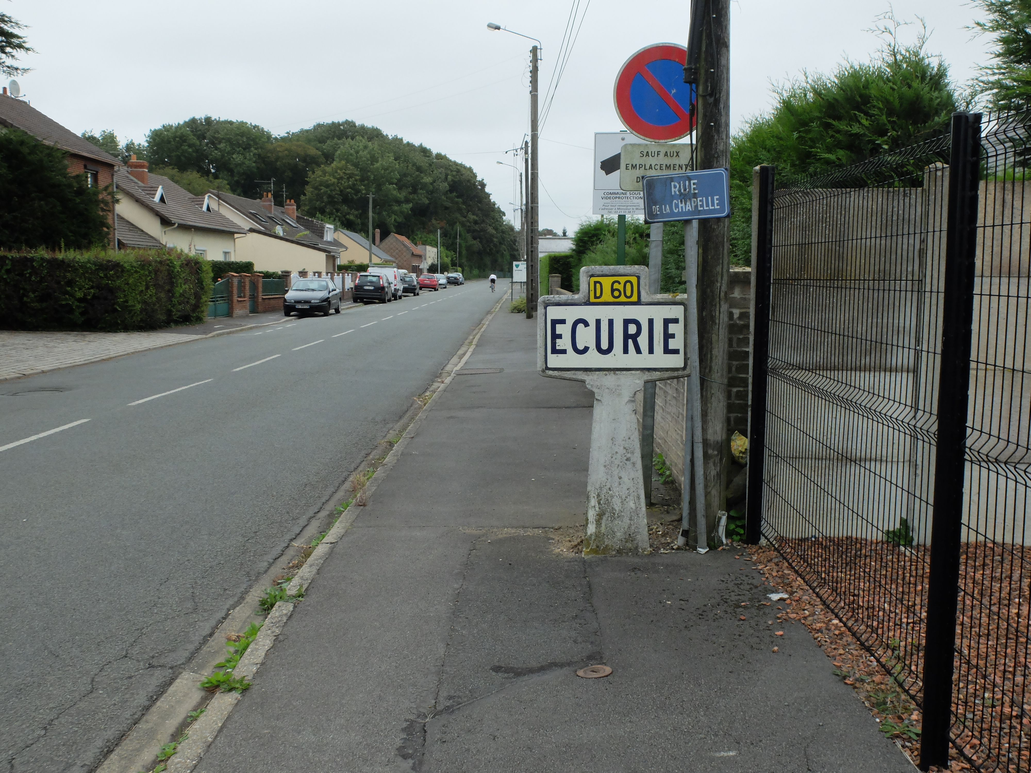 Vue d'une entrée de la commune d'Écurie (Pas-de-Calais).